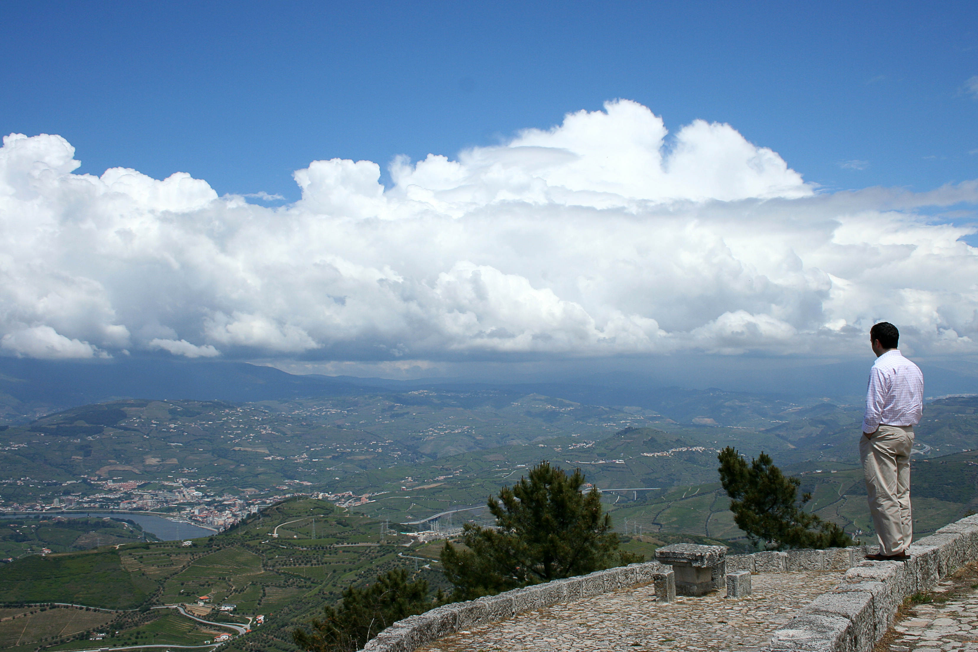 Armamar - Alto Douro Vinhateiro This file was uploaded for Wiki Loves Monuments in Portugal with the unique identifier 8983641.